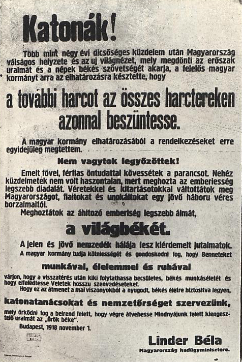 Kriegsminister Linder 1. November 1918 Aufruf (sinngemäß): Soldaten ! Es ist 4 Jahre gekämpft worden... Gewaltherrschaft.. neue Ideologien ... haben die verantwortliche Regierung veranlasst, auf allen Kriegsschauplätzen die Kampfhandlungen einzustellen... ihr seid nicht Besiegte ... Ihr habt den schönsten Traum der sich sehnenden Menschheit gebracht : den Weltfrieden ( világbéke)